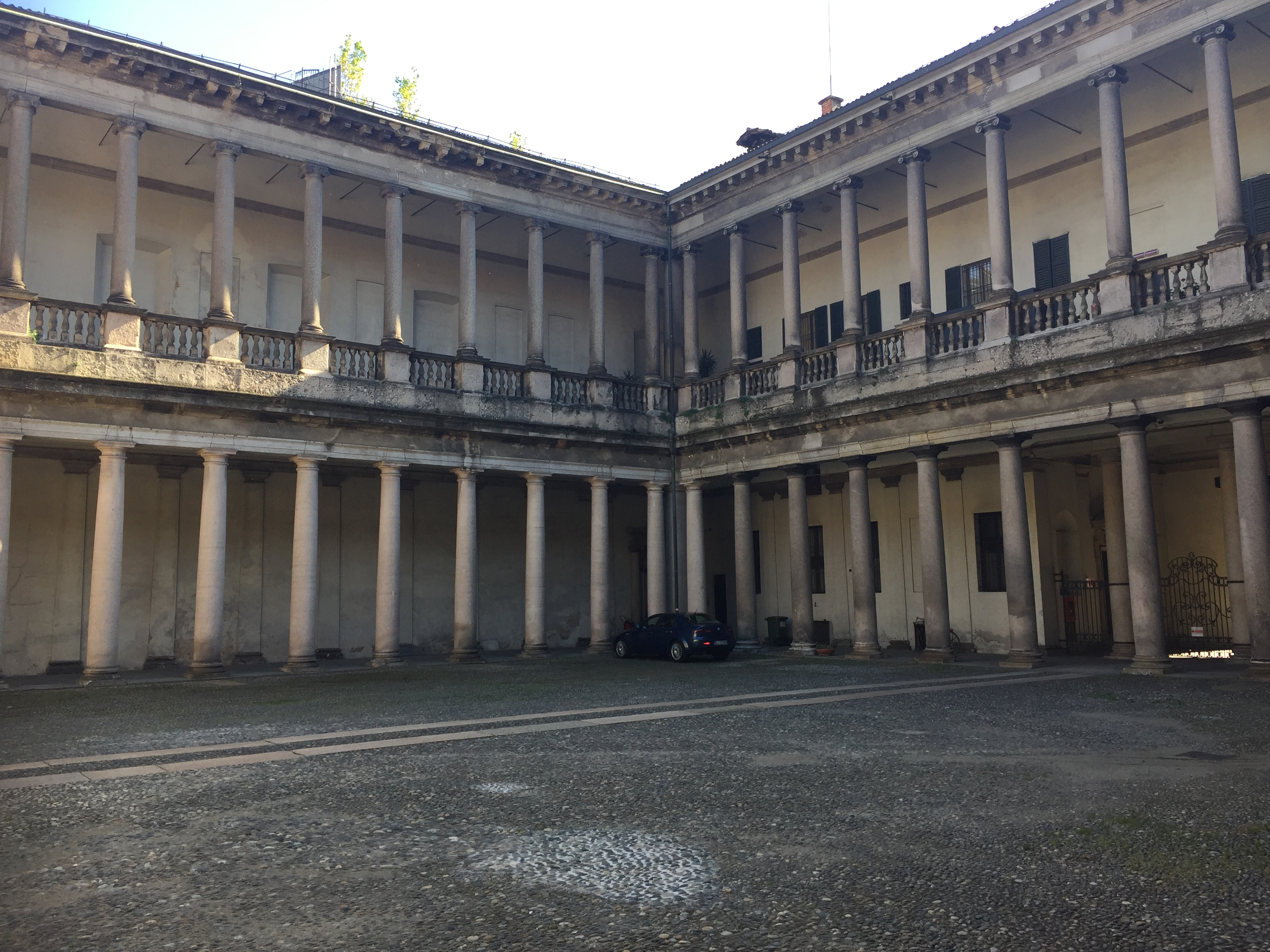 Cortile interno dell'Archivio di Stato di Milano - Palazzo del Senato, particolare